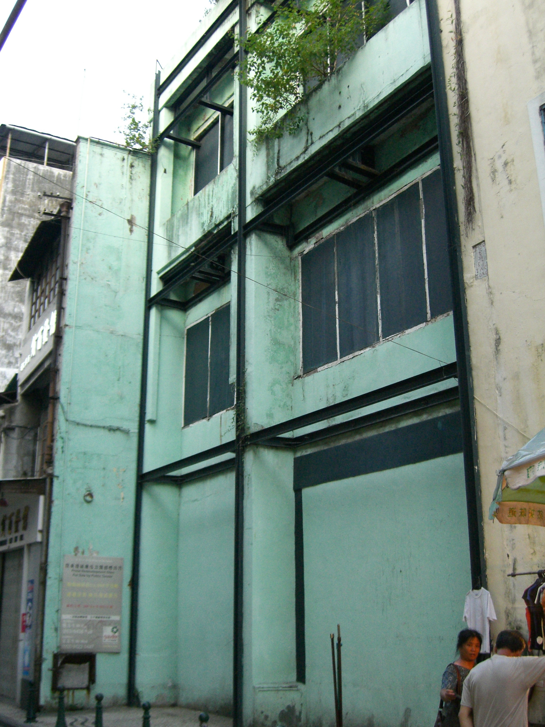 Rua de Cinco de Outubro